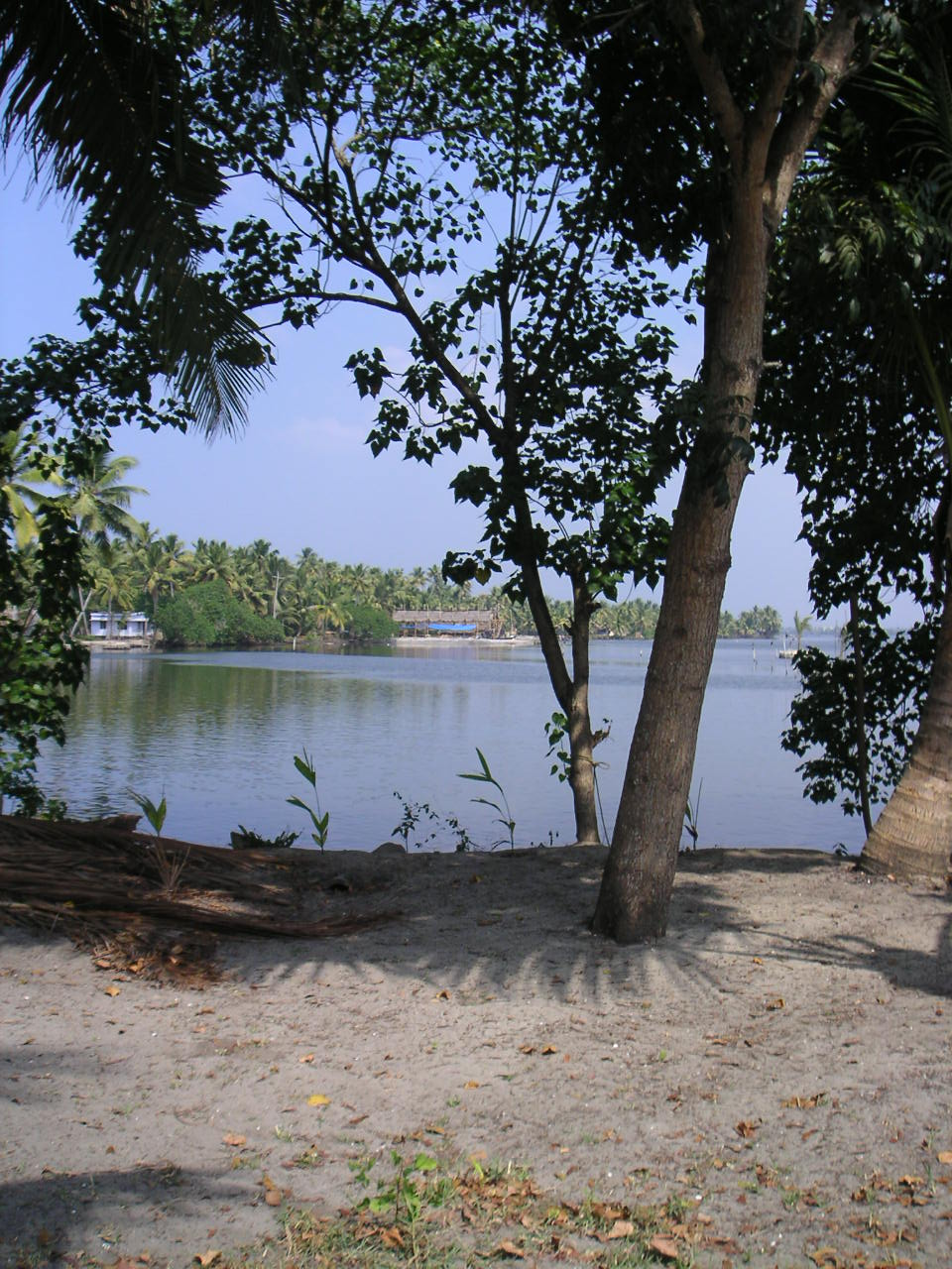 Kerala. Photo: Soman